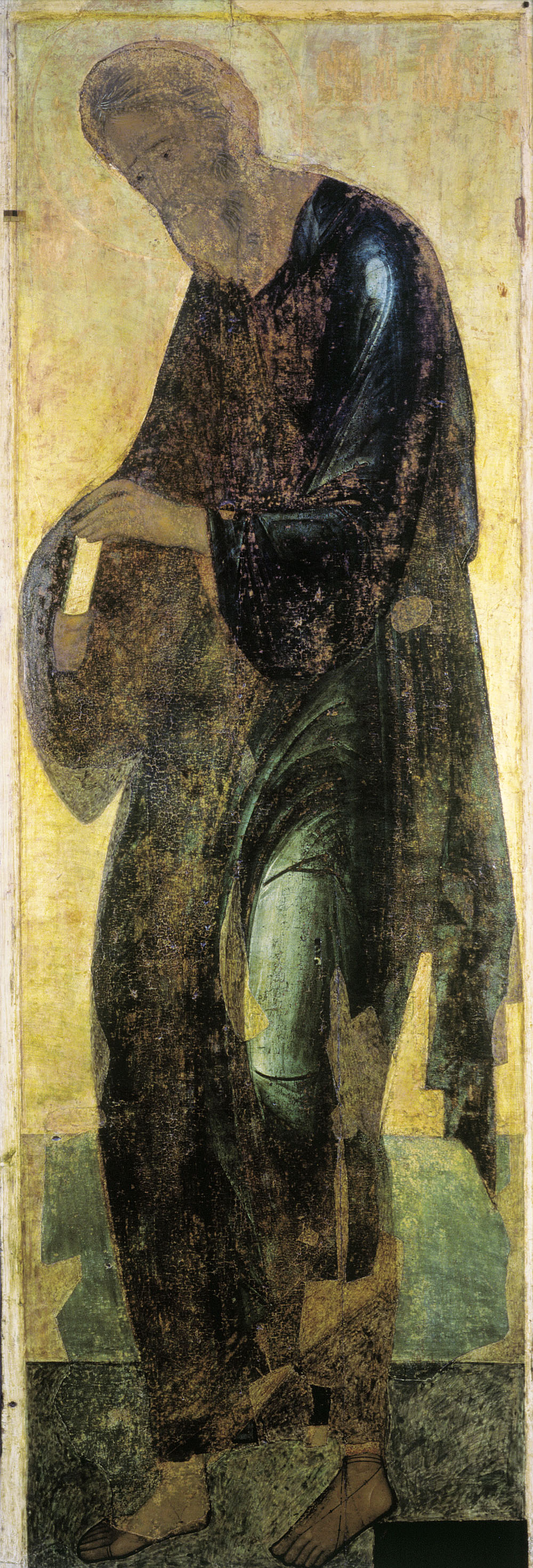 Андрей Первозванный Школа или худ. центр: Москва 1408 г. 313 × 105 см Государственная Третьяковская галерея, Москва, Россия Инв. 19731 Из деисусного чина Успенского собора во Владимире